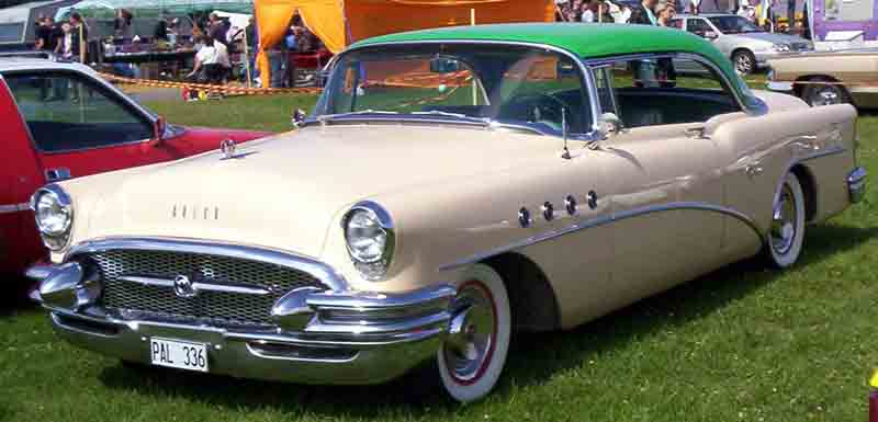 1955 Buick Super Series 50 Model 56R 2-door Hardtop